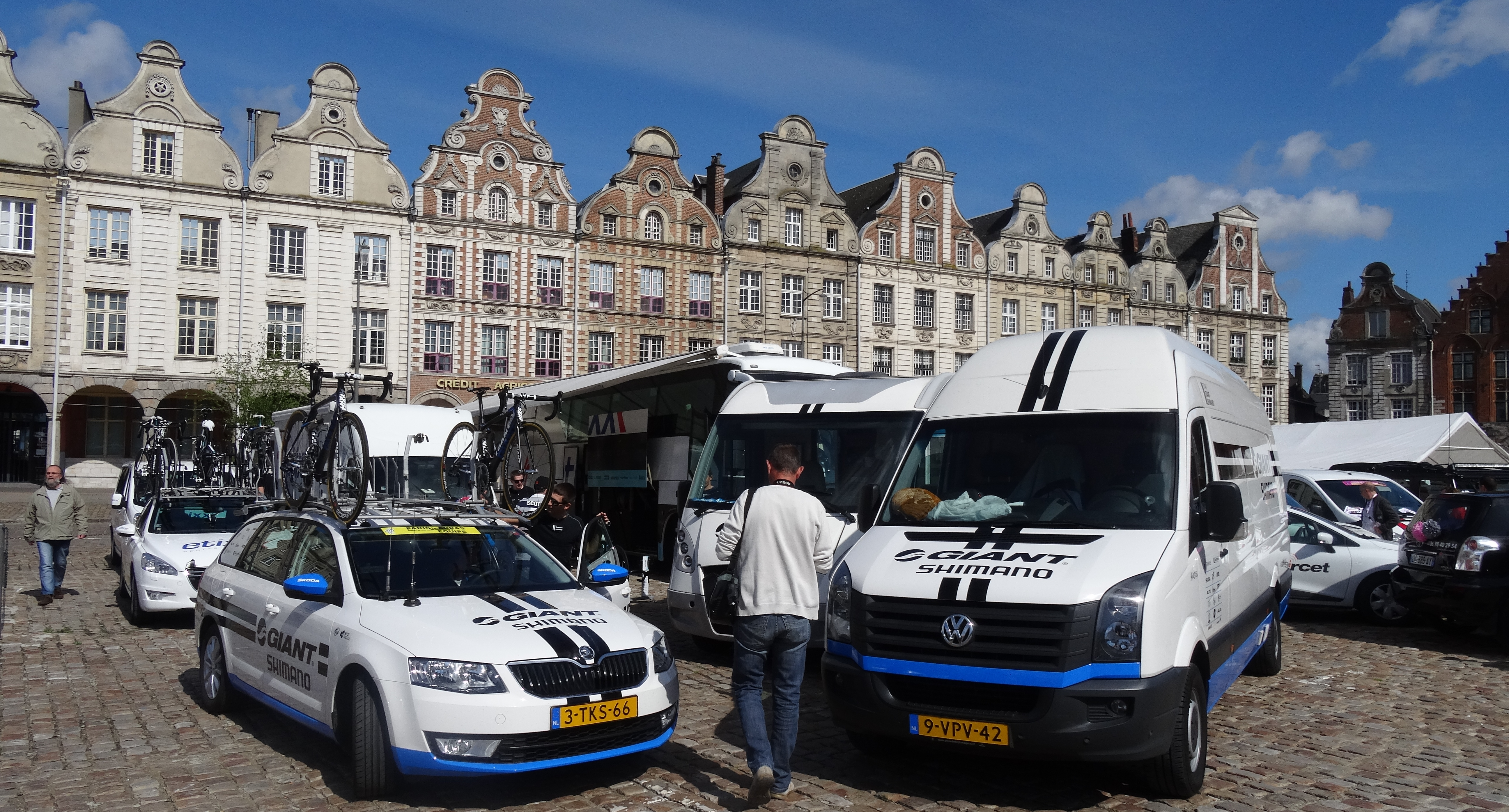 Reportage photographique réalisé le dimanche 25 mai 2014 à l'occasion du départ et de l'arrivée de la troisième étape du Paris-Arras Tour 2014 à Arras, Pas-de-Calais, Nord-Pas-de-Calais, France.